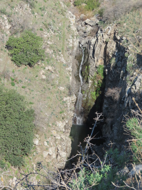 Gamla in Golan גמלא